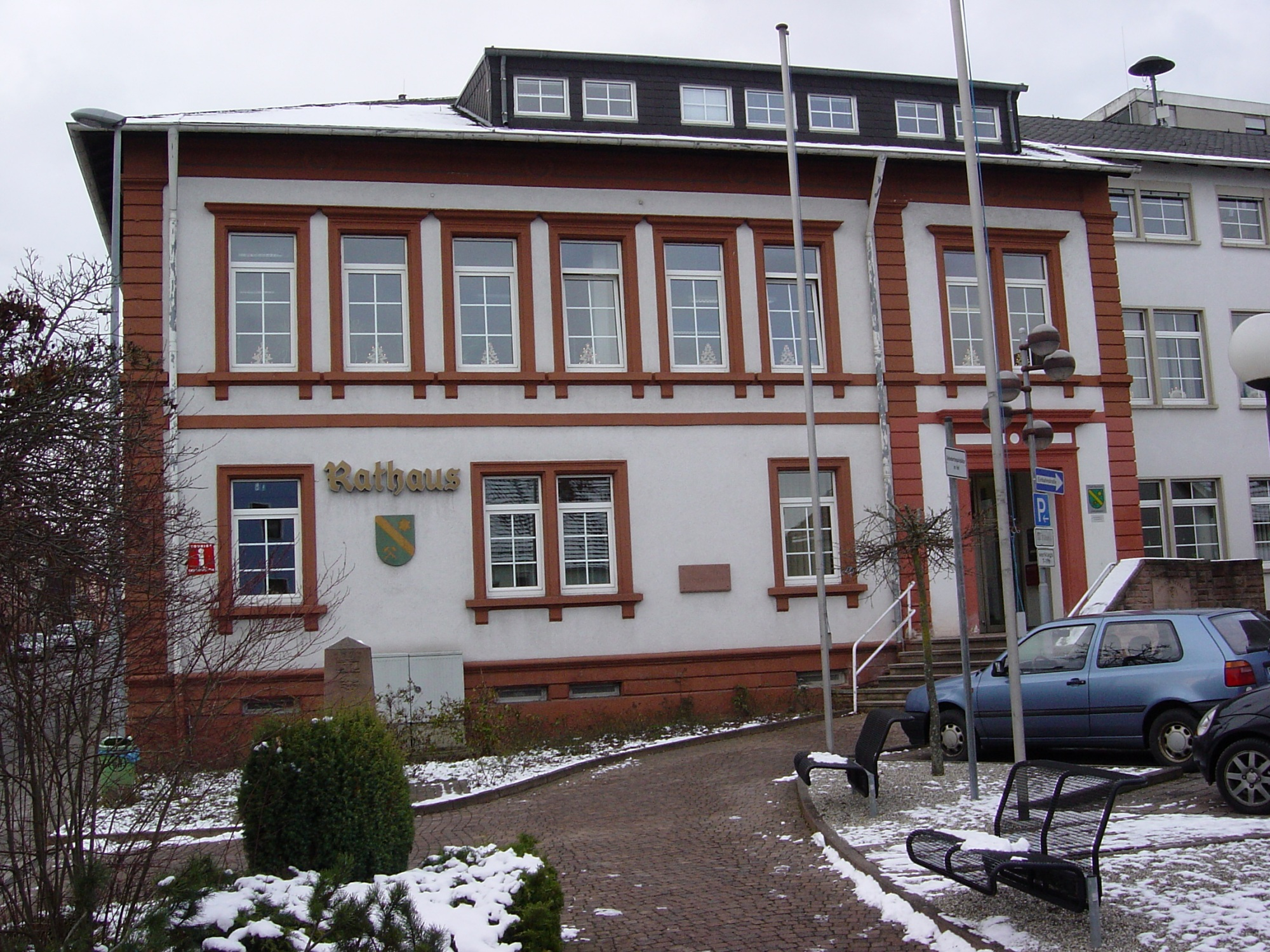 Rathaus I, Rathausstr. 68, 66450 Bexbach